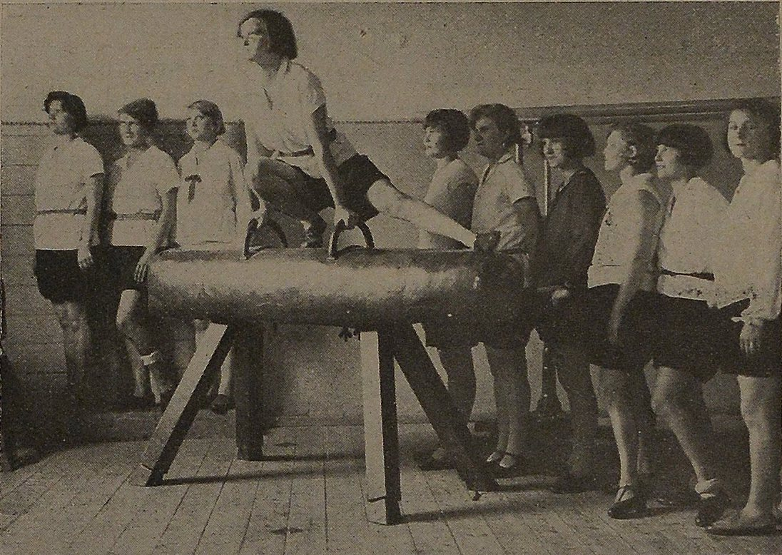 TG Sokół Dziedzice żeńska sekcja gimnastyczna